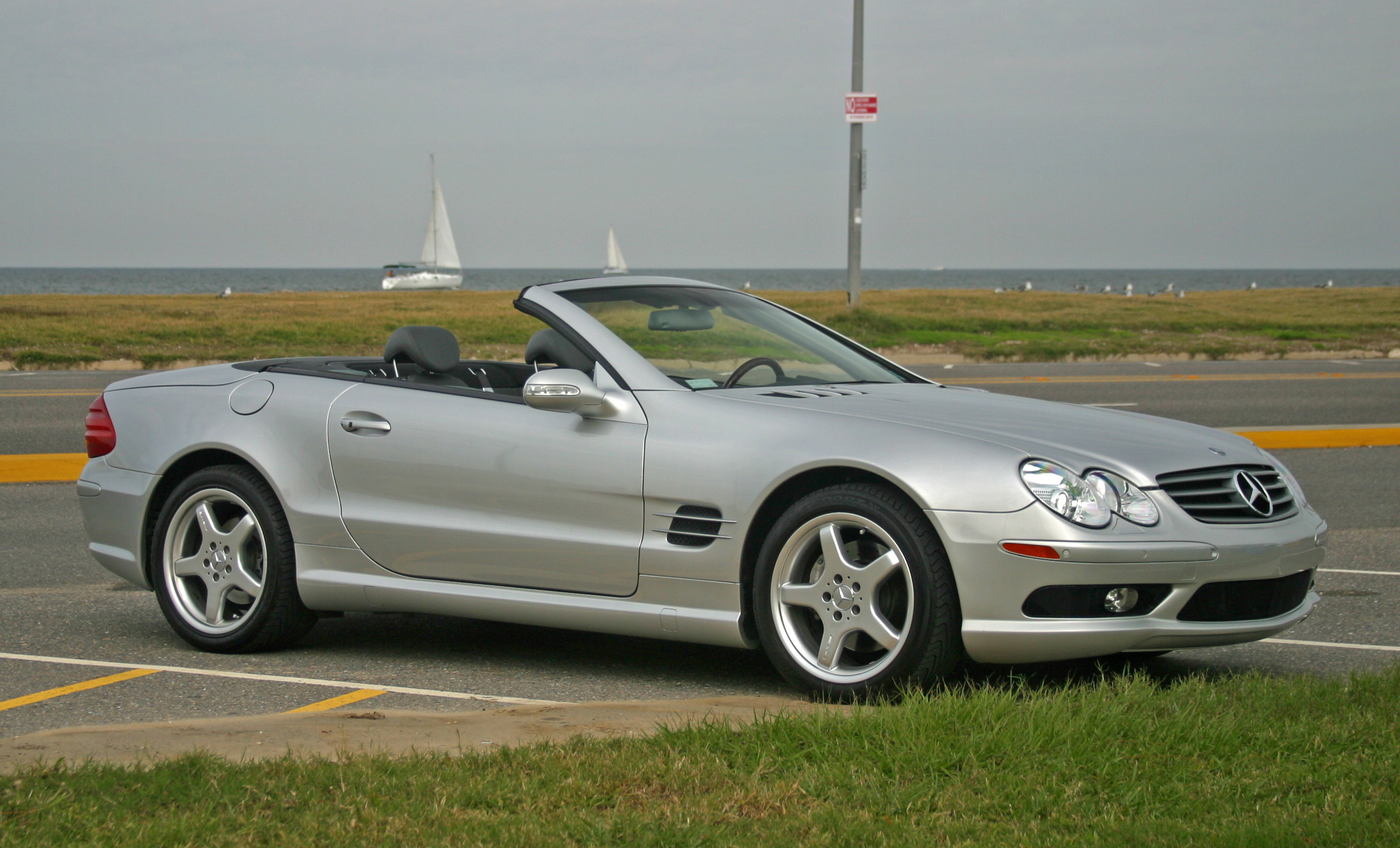 Mercedes-Benz 2003 SL 500